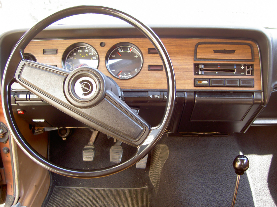 Ford Capri 1973 mit Vinyldach (Im Privatbesitz) 2005